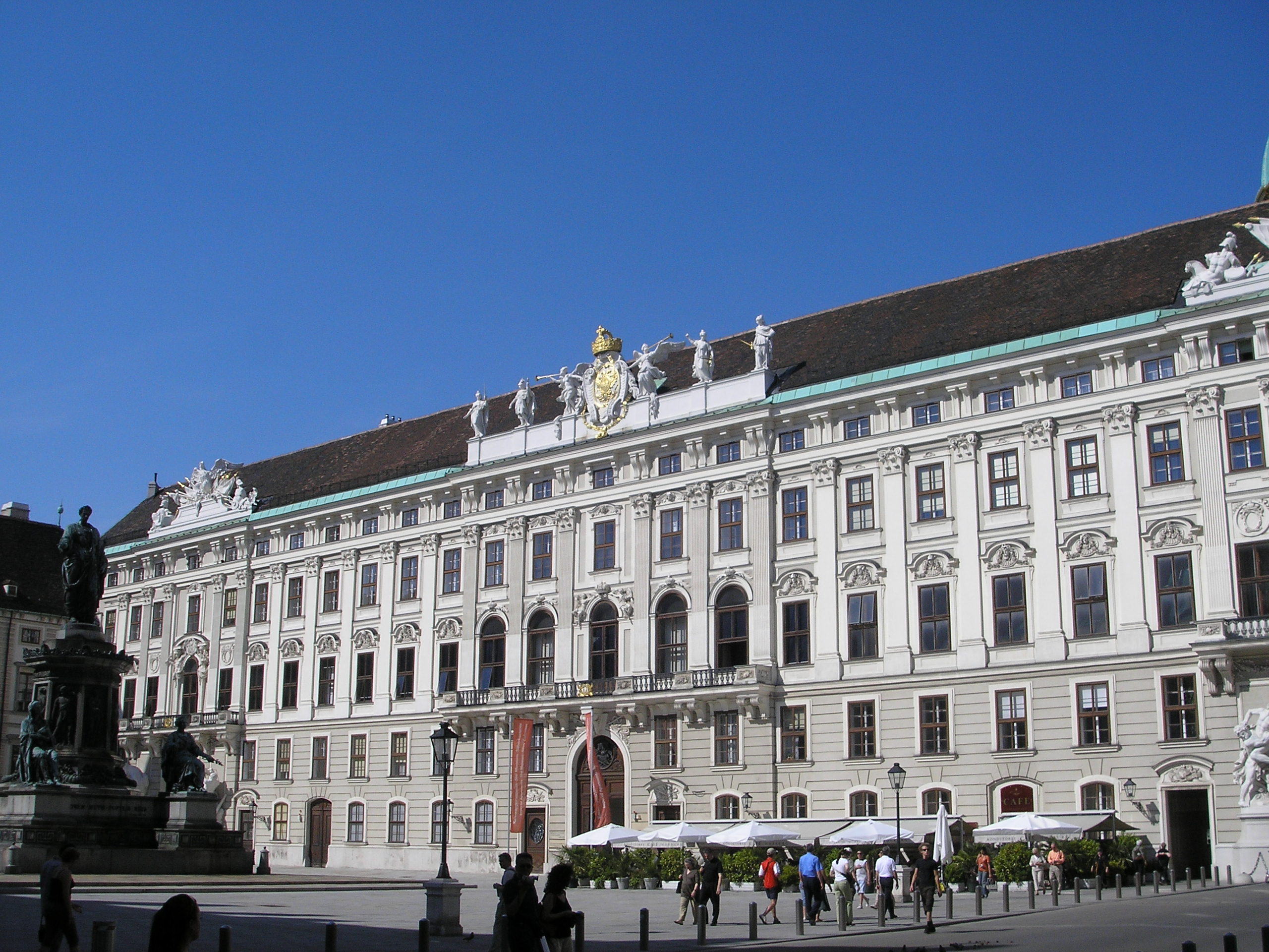 The Reichskanzleitrakt of the Hofburg Imperial Palace in Vienna.